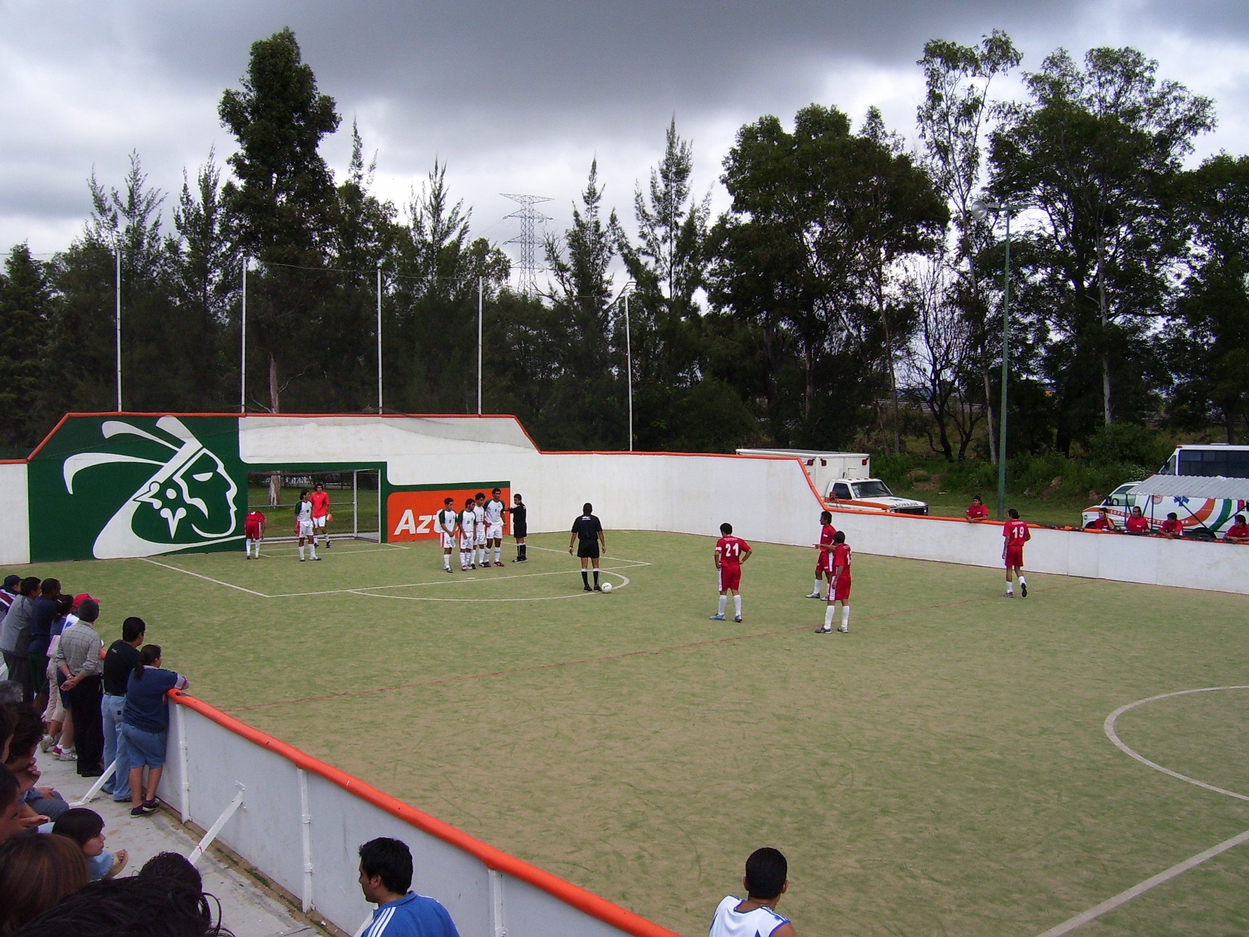 Indoor Football Game (Fútbol Rápido) game, Universidad de las Américas - Puebla vs. Universidad del Valle de México. Taken at UDLA-P with a Kodak Easyshare Digital Camera C340